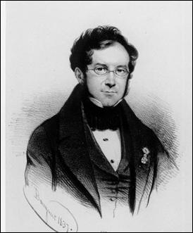 Ferninand Meeûs, homme d'affaires et homme politique belge